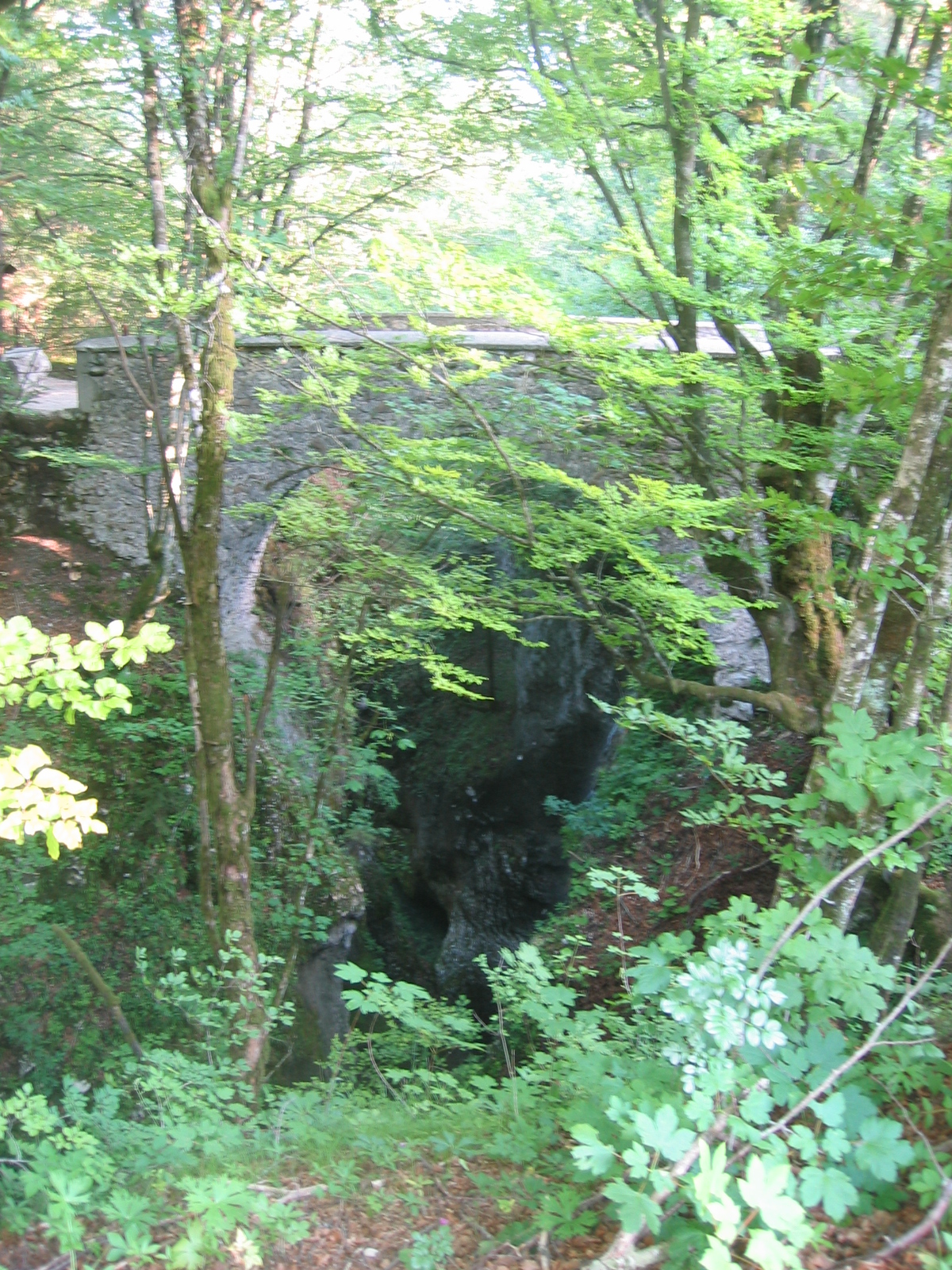 Hudičev Most (Devil's bridge) at Voje near Bohinj, Slovenia